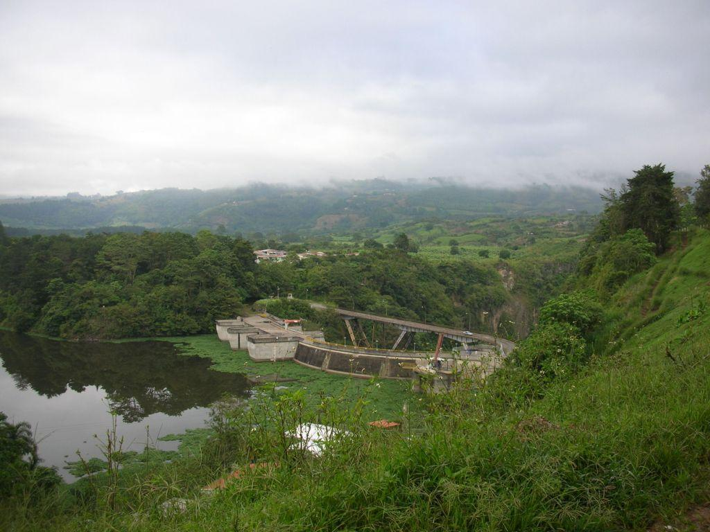 Cachí Dam, Cartago, Costa Rica